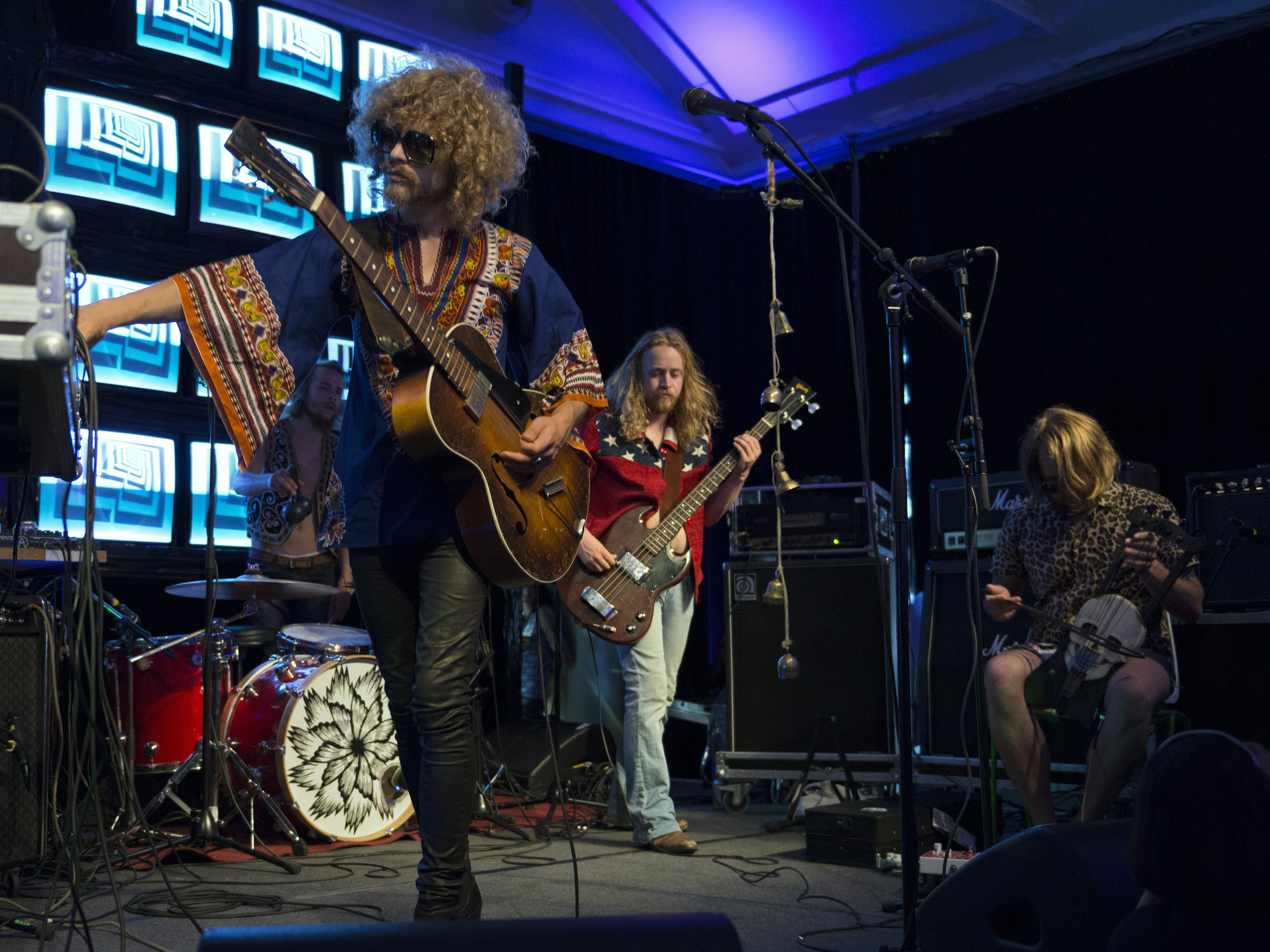 Jouhikko Death Hawksien esityksessä Flow Festivaaleilla 10.08.2014